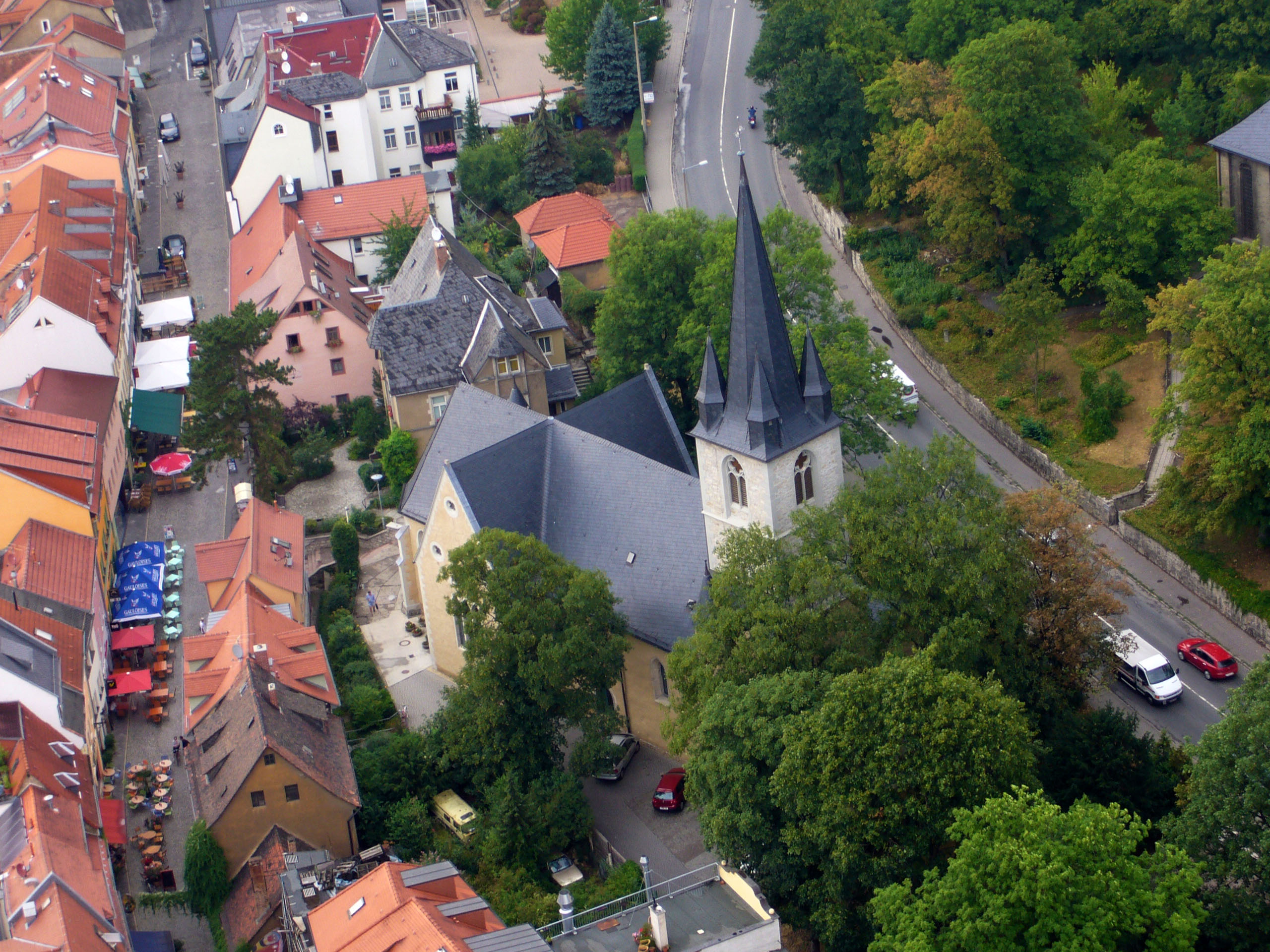 Kirche St. Johannes Baptist in Jena vom JenTower aus fotografiert